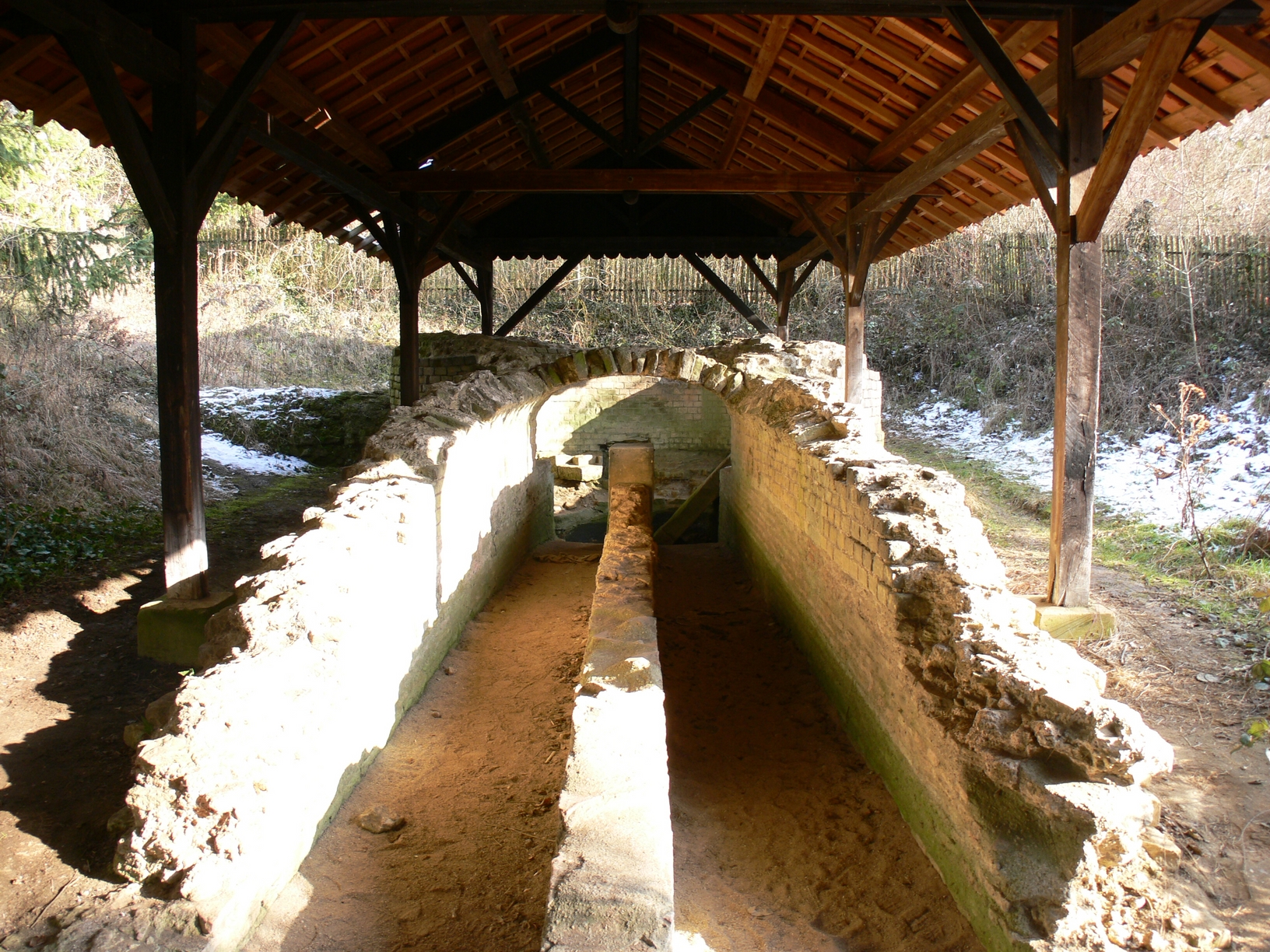 Aqueduc de Gorze à Metz (Lorraine) - bassin collecteur de l'aqueduc aérien au niveau de Jouy-aux-Arches.